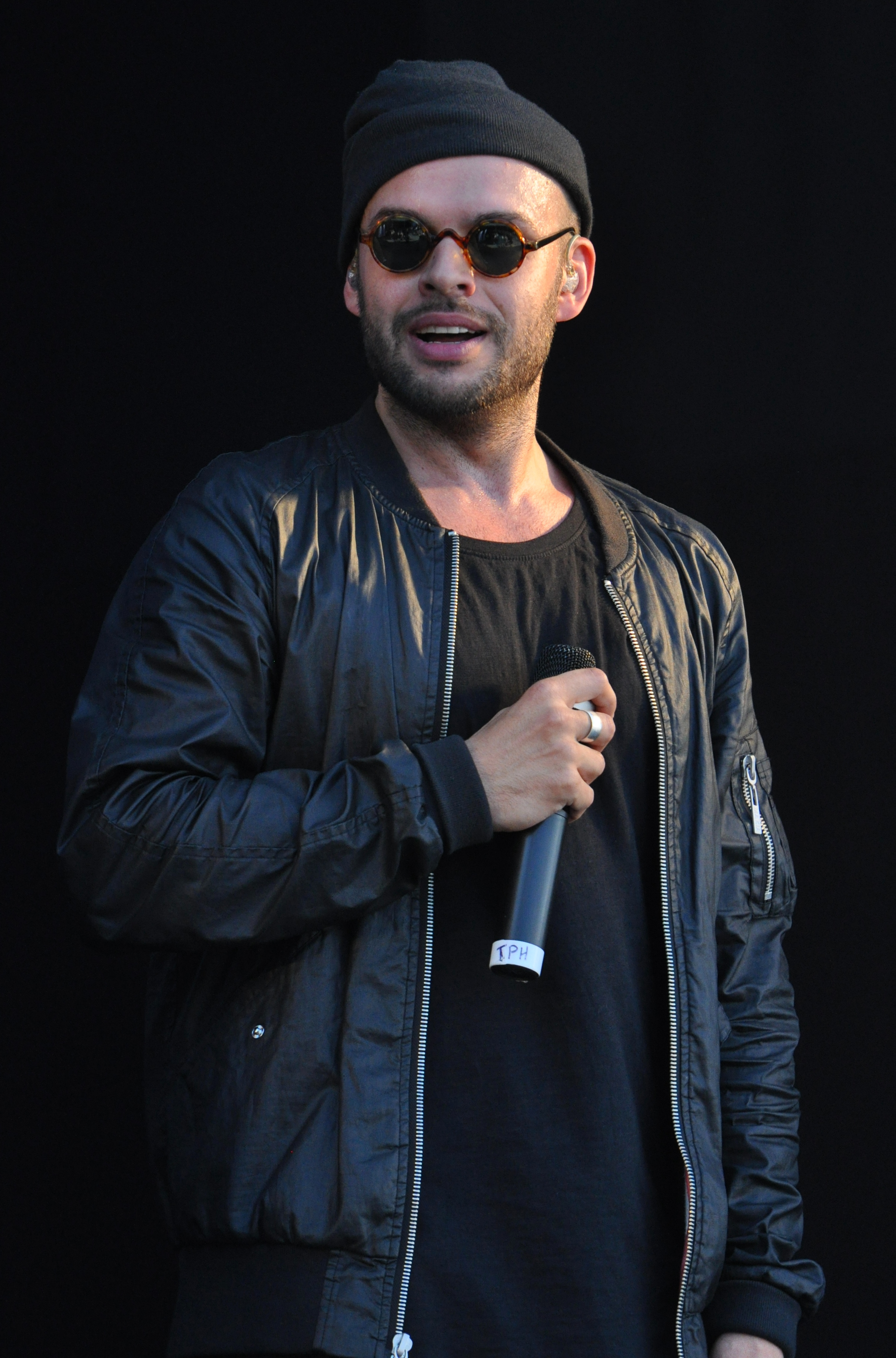 Timo Pieni Huijaus esiintymässä Kiekkotorilla Sanomatalon edustalla.